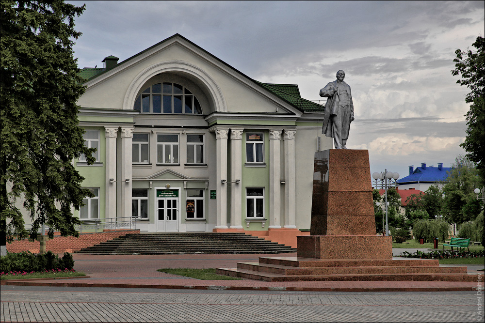 Цэнтр Ваўкавыска